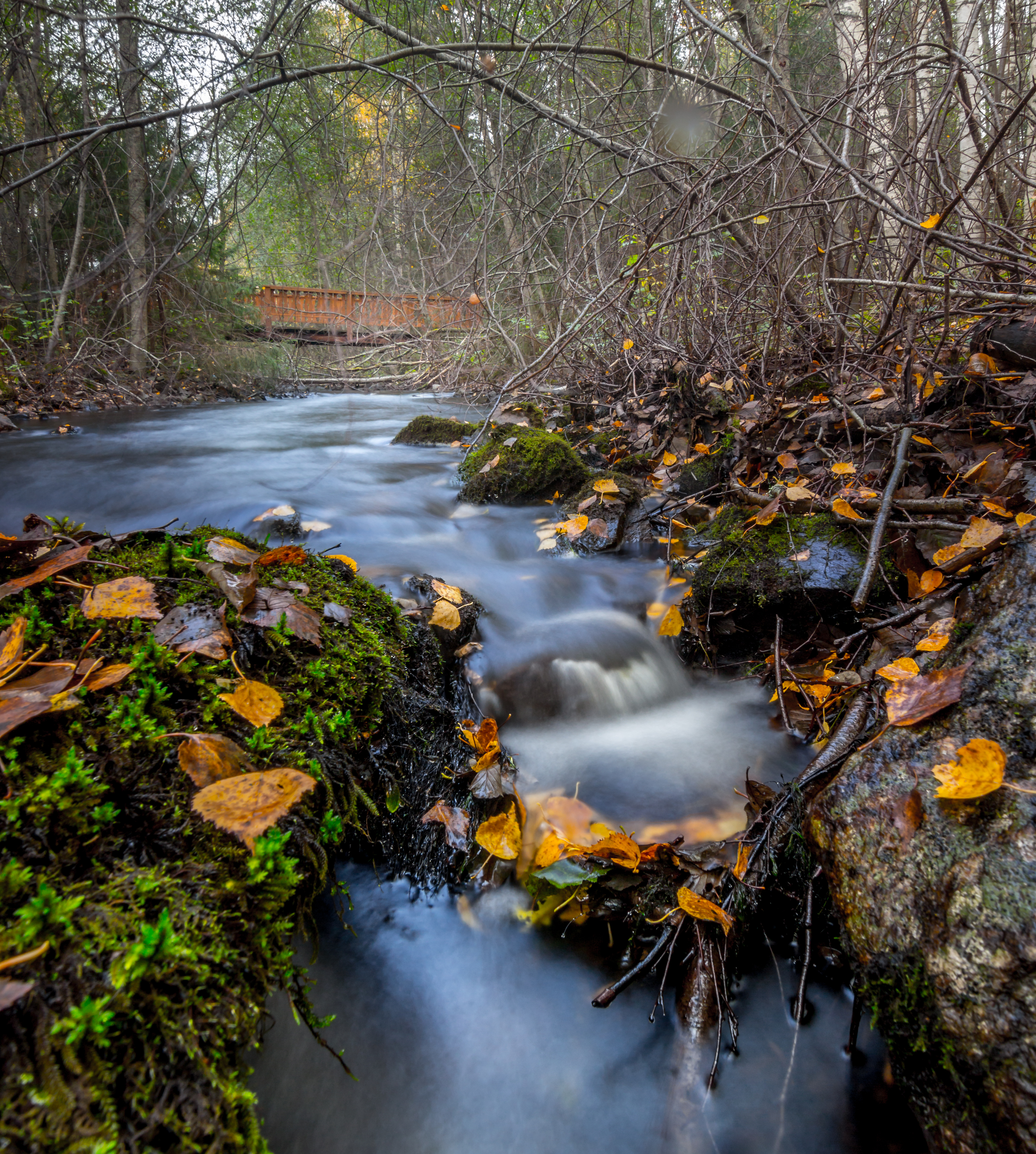 Ручей на территории заповедника Кивач